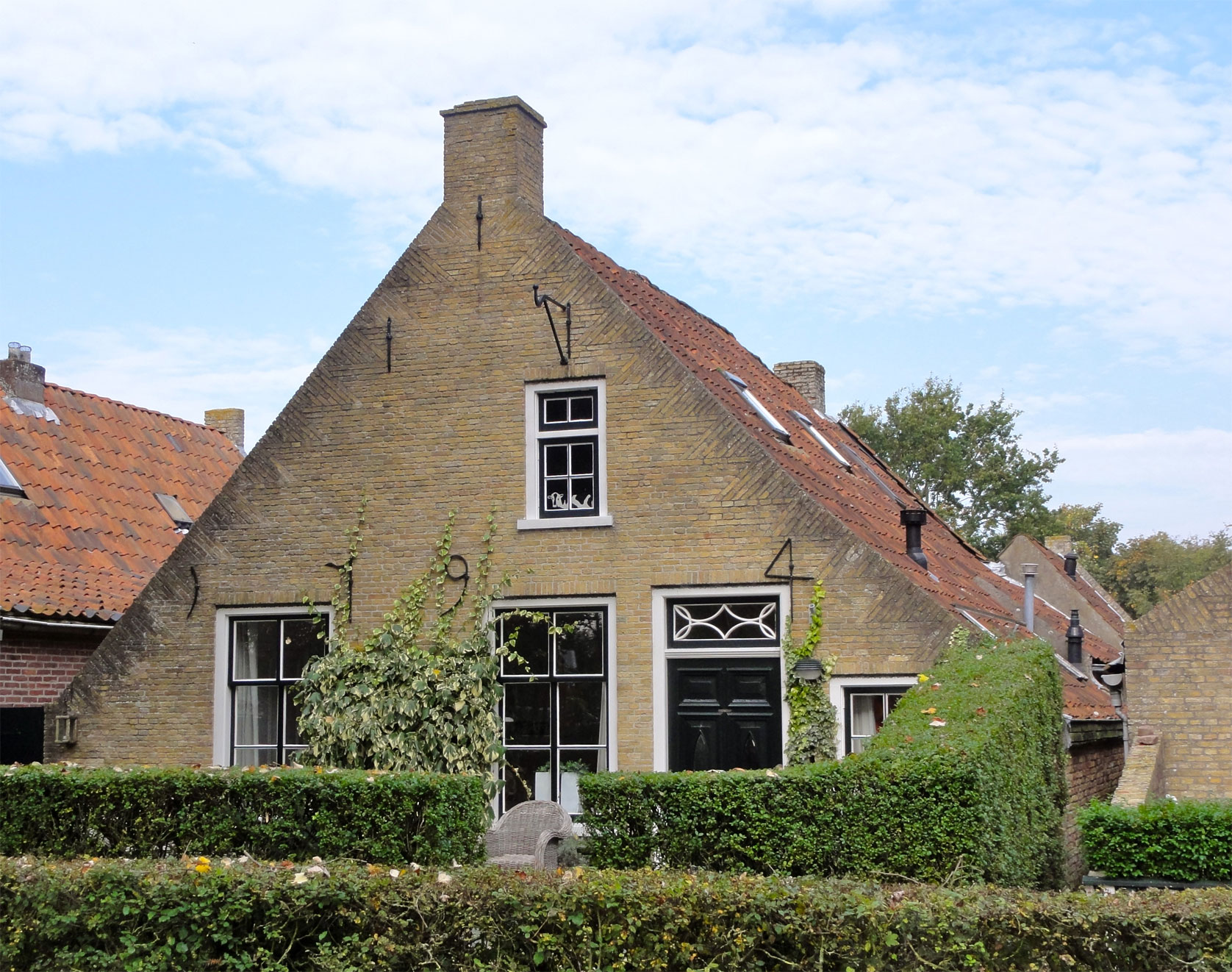 Langestreek 40 in Schiermonnikoog